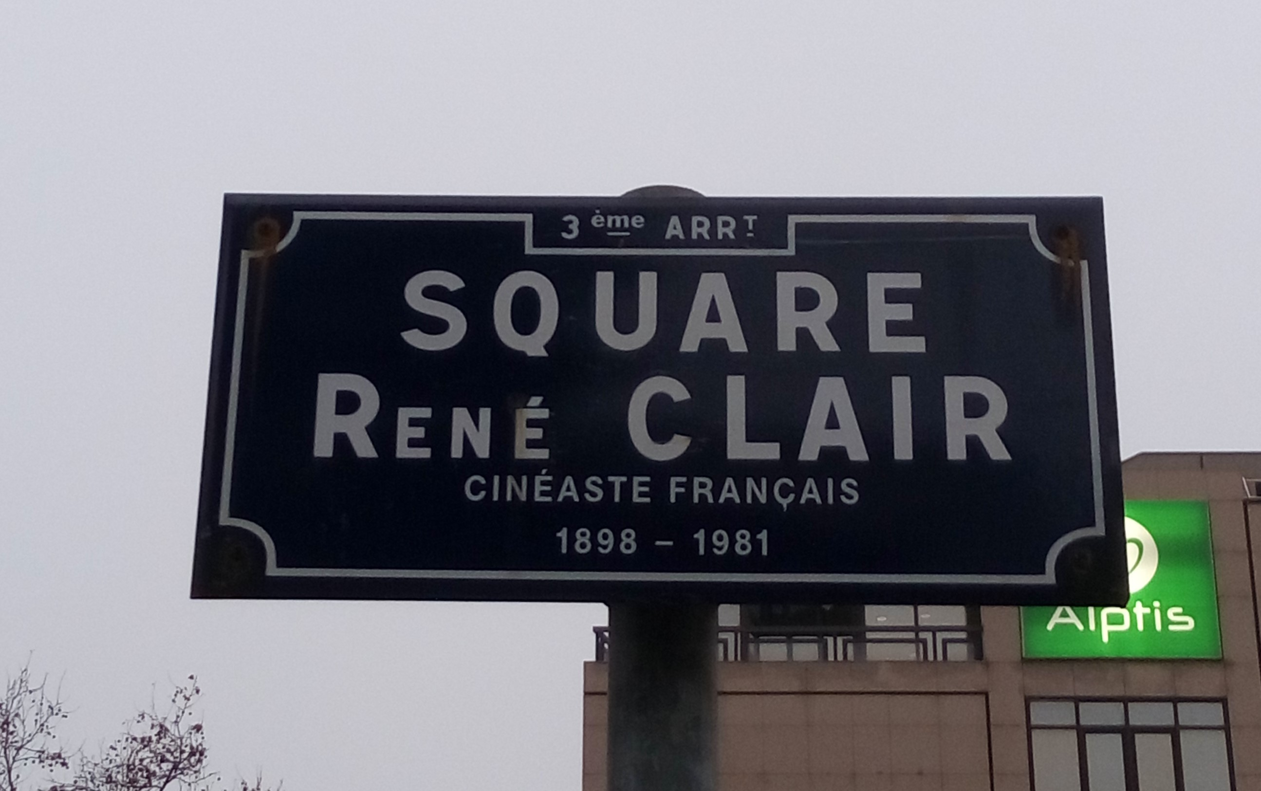 Plaque de rue du square René-Clair, dans le 3e arrondissement de Lyon.